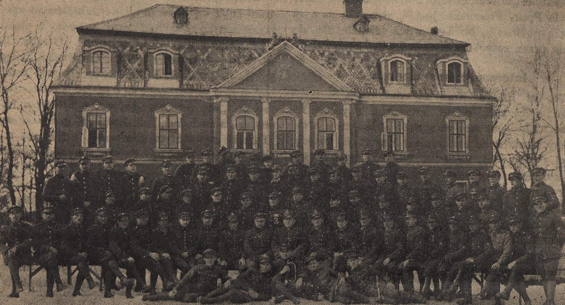 Uczestnicy Kursu Unitarnego dla Podoficerów Związku Strzeleckiego IV turnusu przy 11 Pułku Piechoty w Rybnej. Pośrodku siedzą (od prawej do lewej): podokręgowy ZS Władysław Tarnawski (Komendant Podokręgu ZS "Śląsk"), podokręgowy ZS Antoni Balko (Inspektor Komendy Głównej ZS) i kompanijny ZS Władysław Demkow (Komendant Kursu).